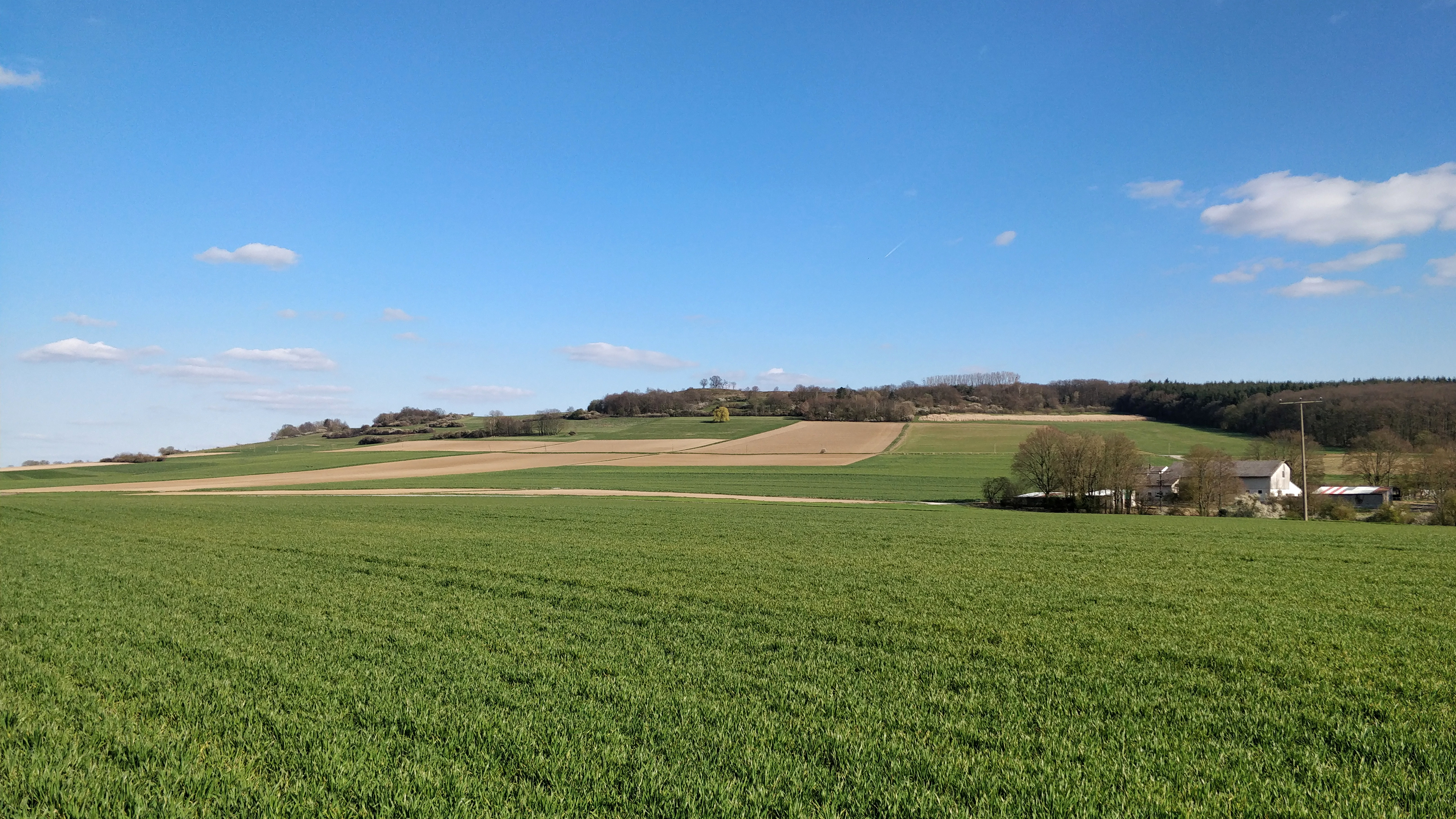 Mensfelder Kopf, Hünfelden, von Westen gesehen